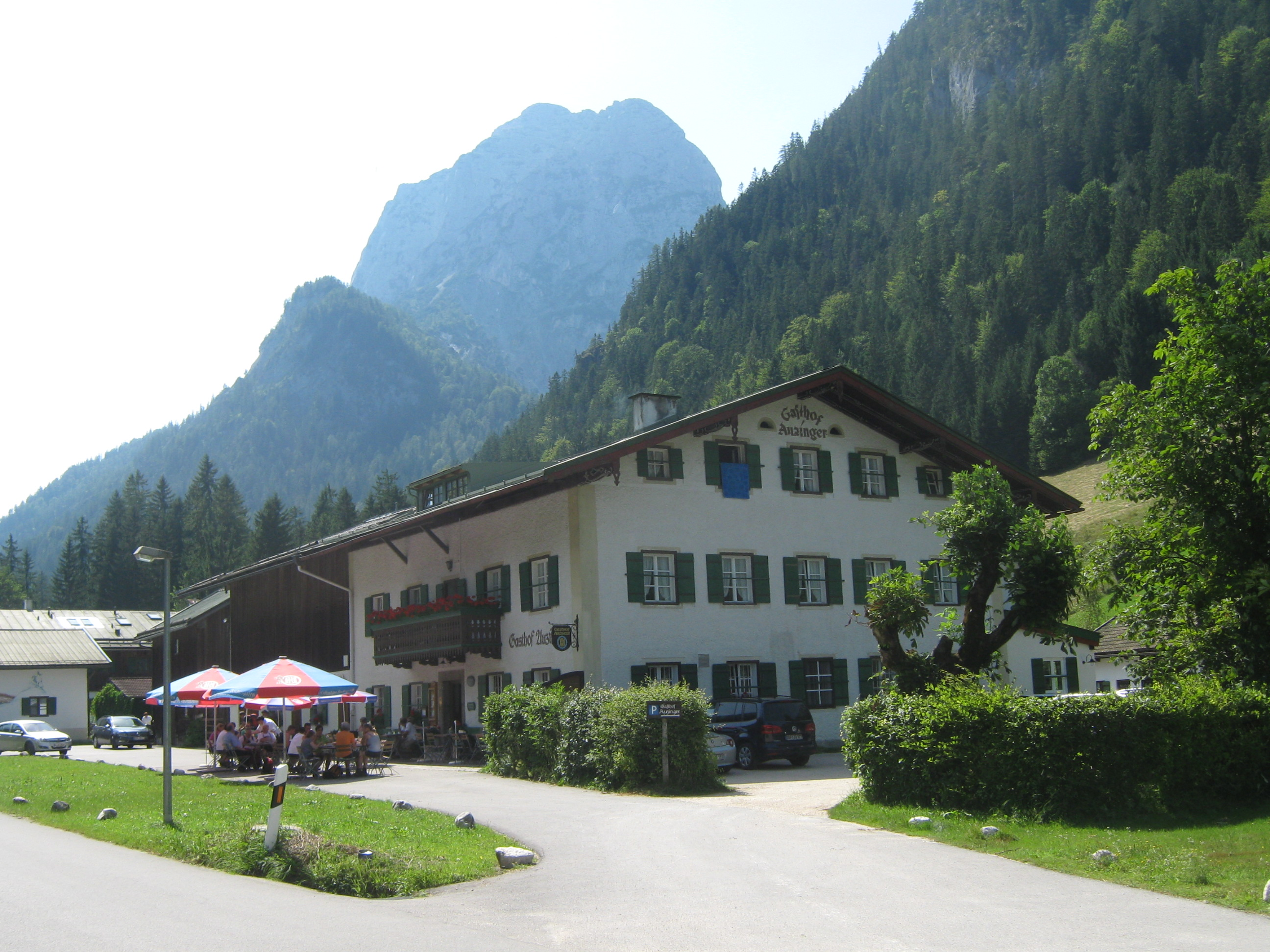 Gasthof Auzinger, Hintersee, Antenbichl, Ramsau bei Berchtesgaden, von der Hirschbichlstraße aus (Osten)